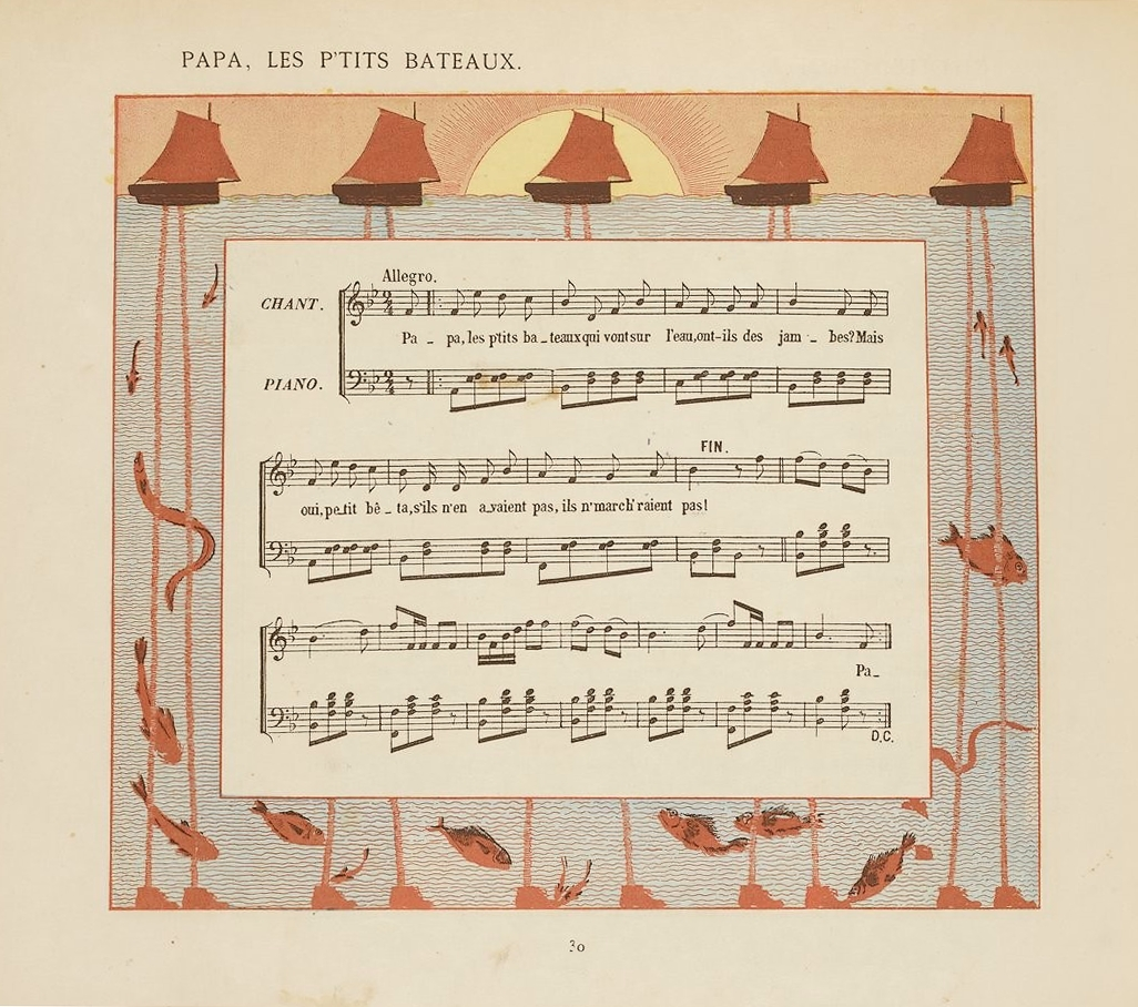 Page d'un recueil de chansons enfantines édité en 1884. Illustrations de M. Boutet de Monvel, Librairie Plon, 1884.